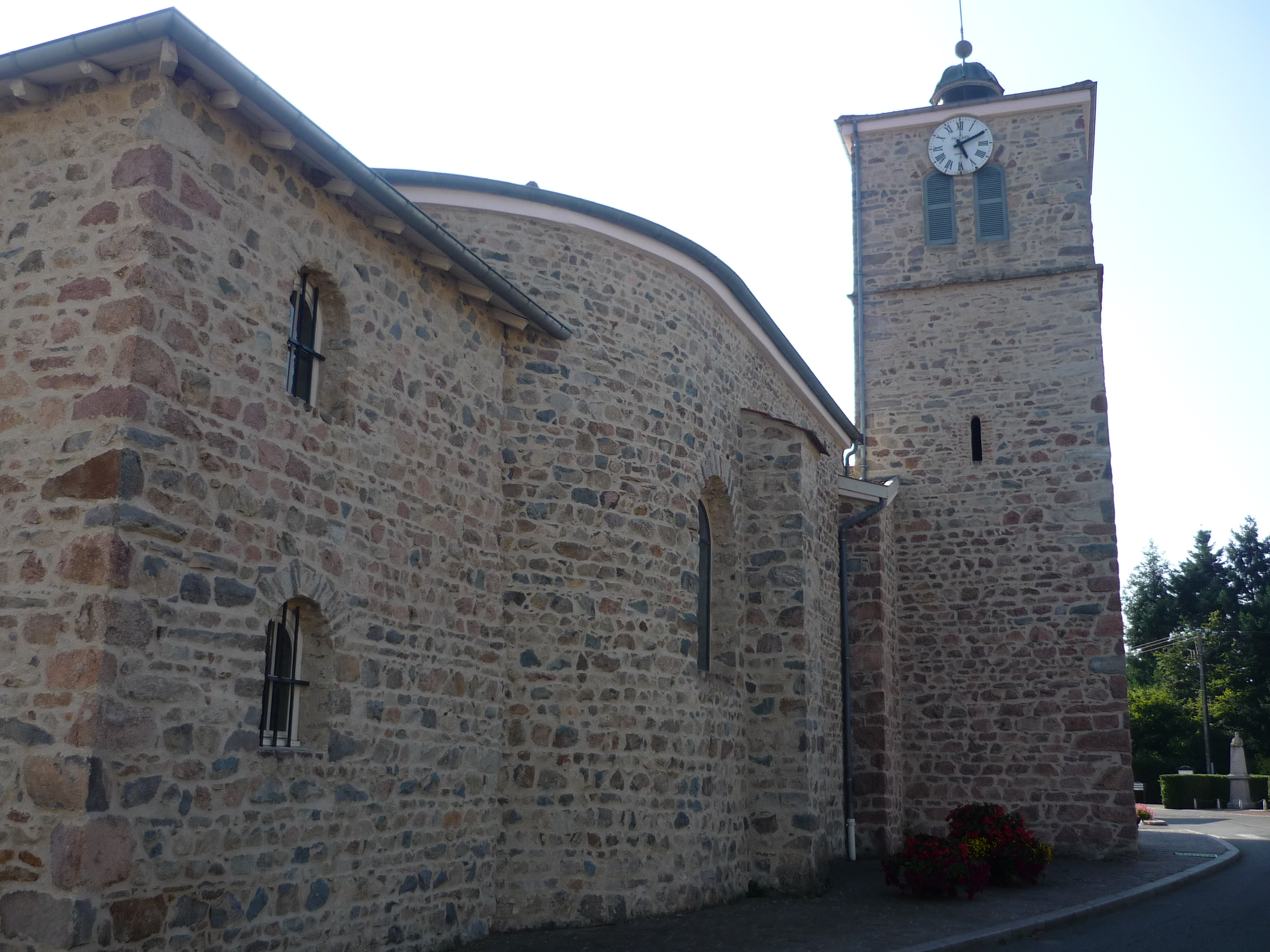 Église de Meaux-la-Montagne